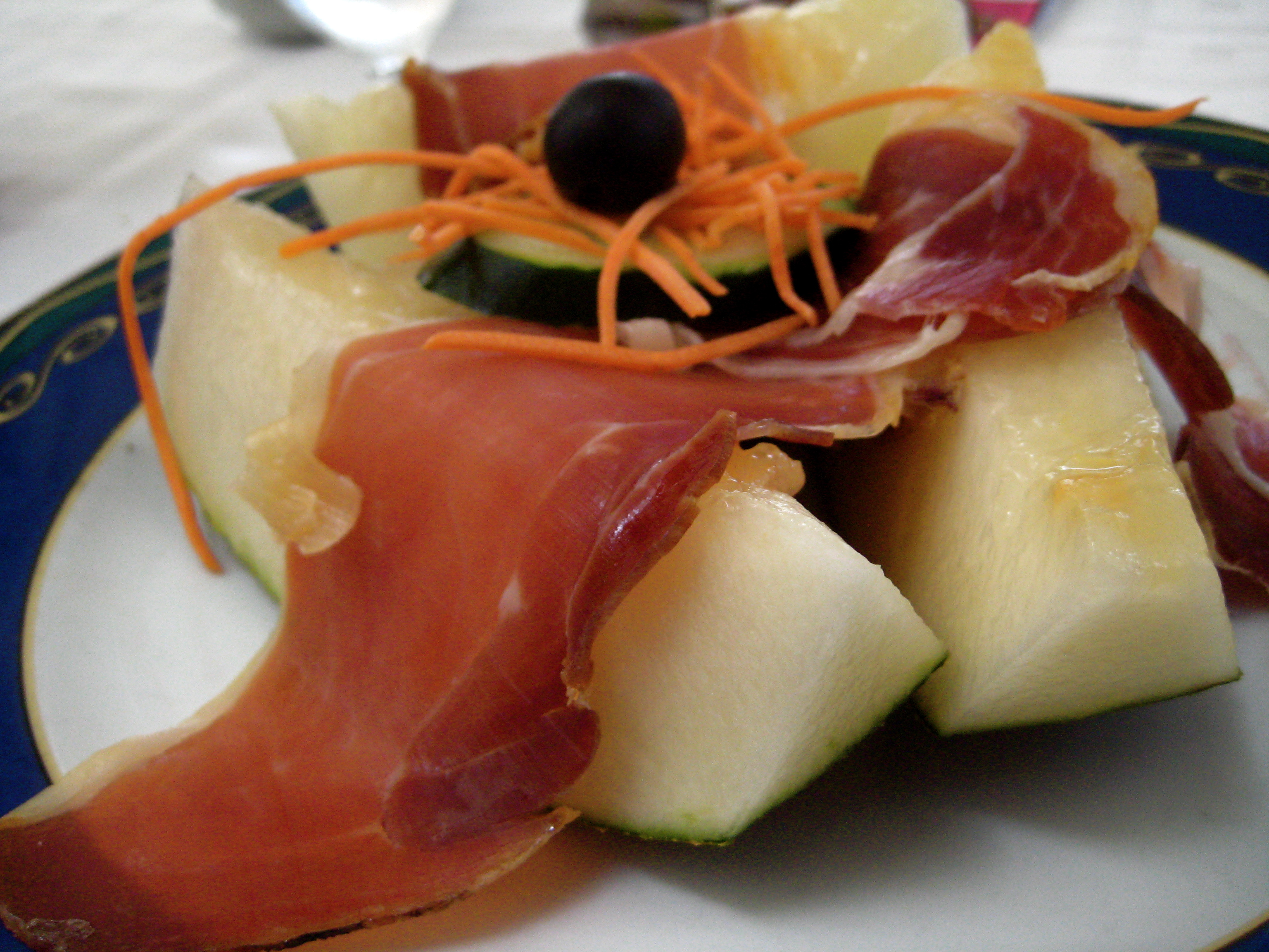 Melón con jamón, servido en Barcelona.